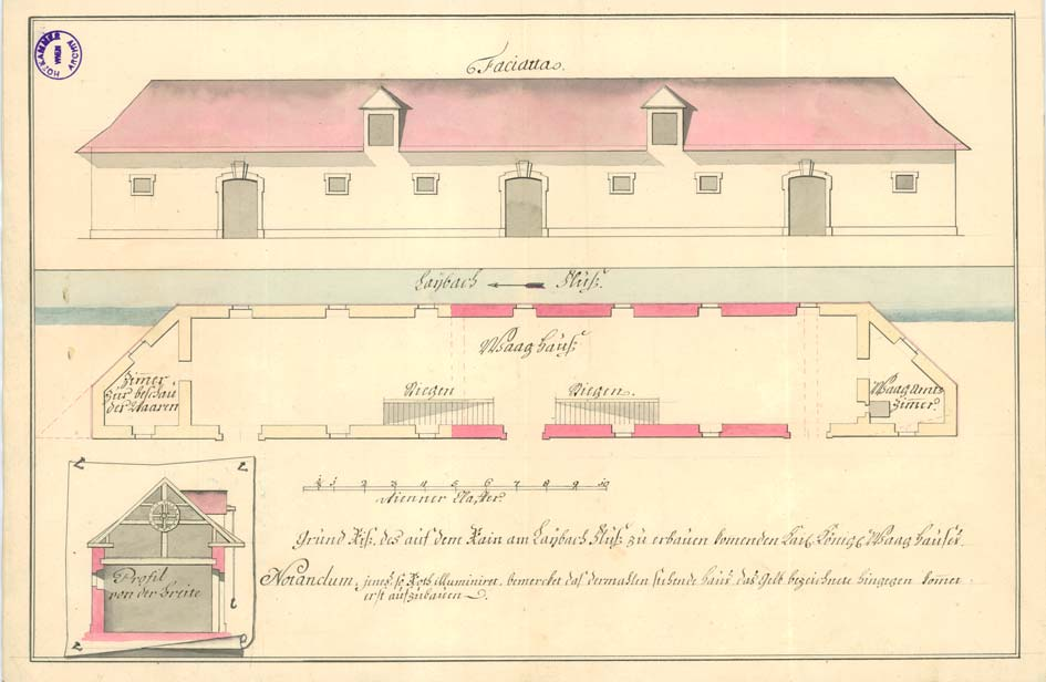 Načrt za novo tehtnico na Bregu v Ljubljani